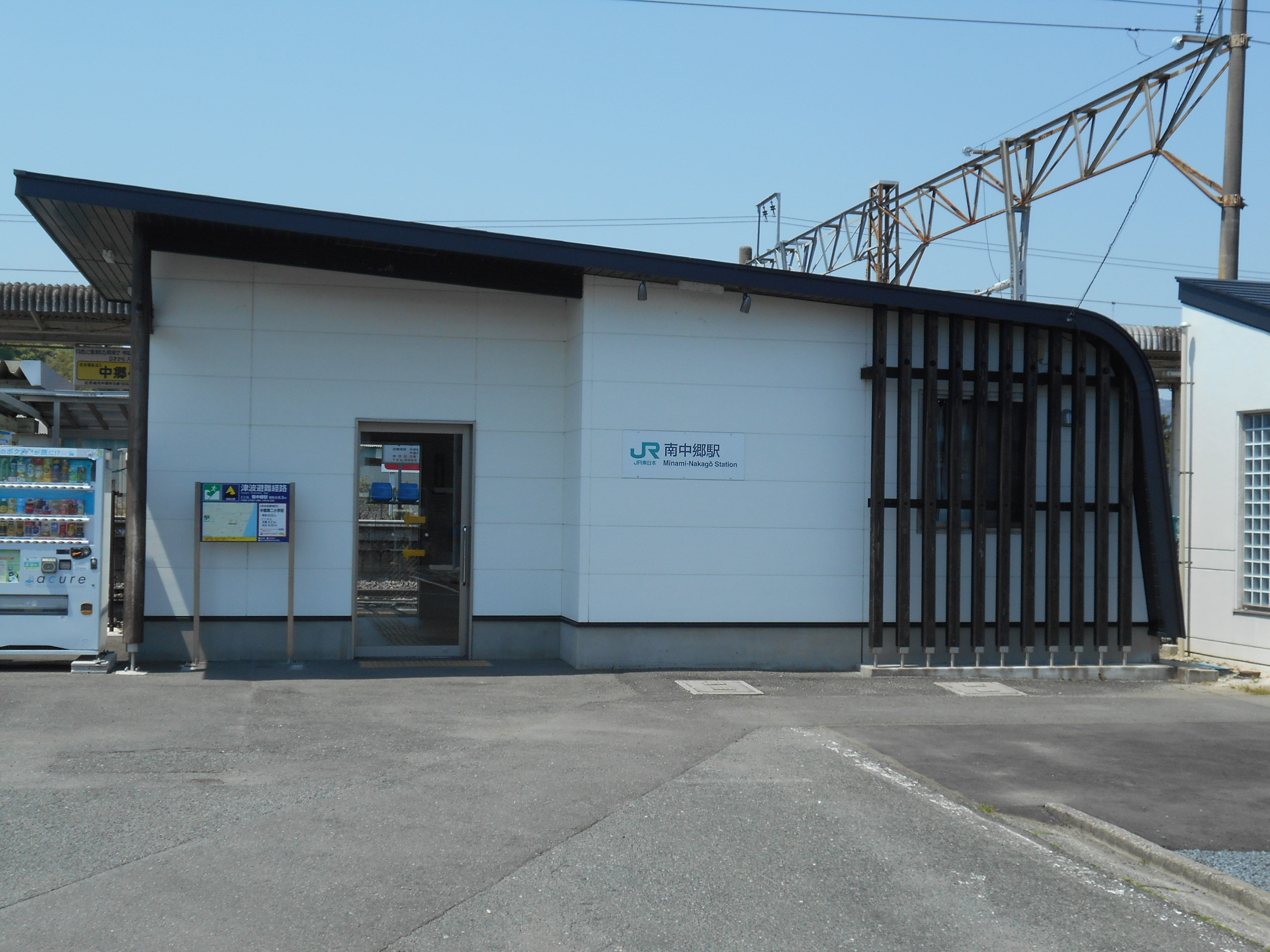 JR東日本 南中郷駅